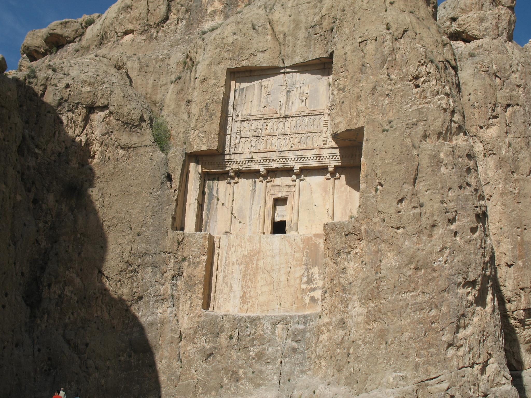 Tomb of Xerxes in Naqsh Rostam - آرامگاه خشایارشا در نقش رستم